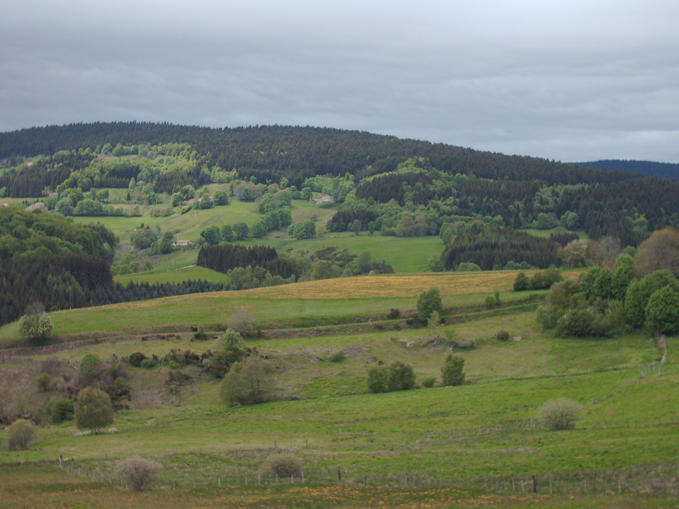 Photographie prise par Jérémie Marchand